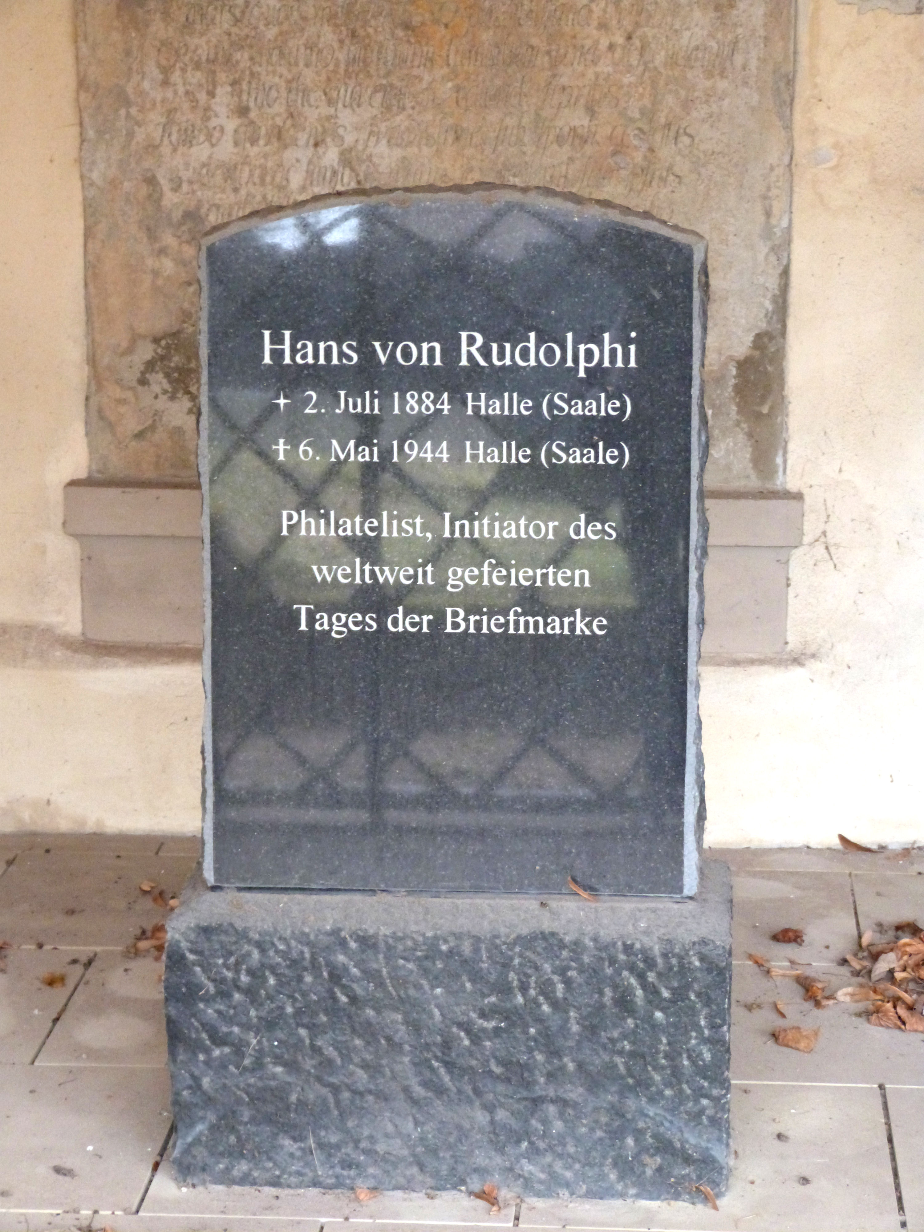 Grab von Hans von Rudolphi, Stadtgottesacker Halle, Bogen 47